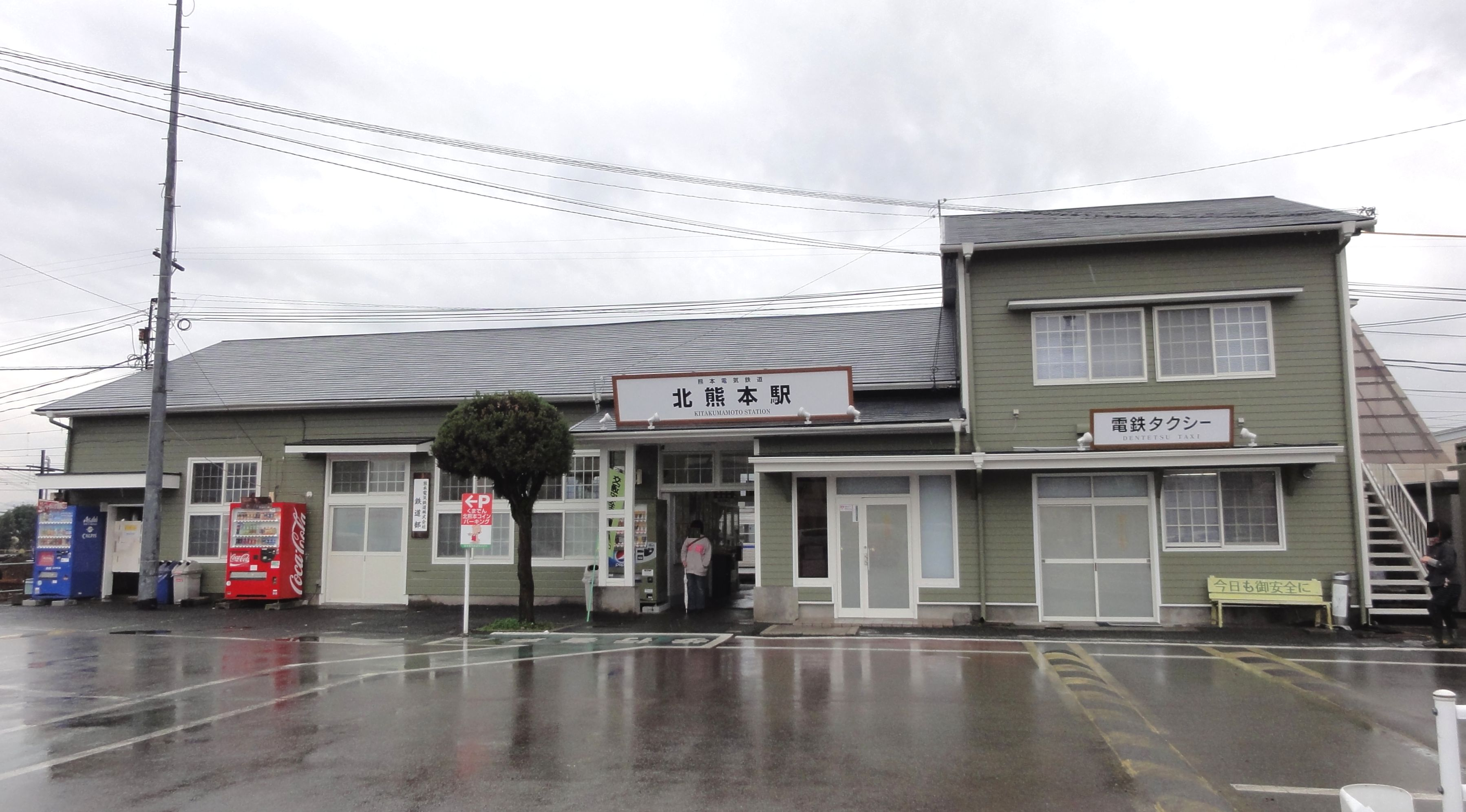 北熊本駅